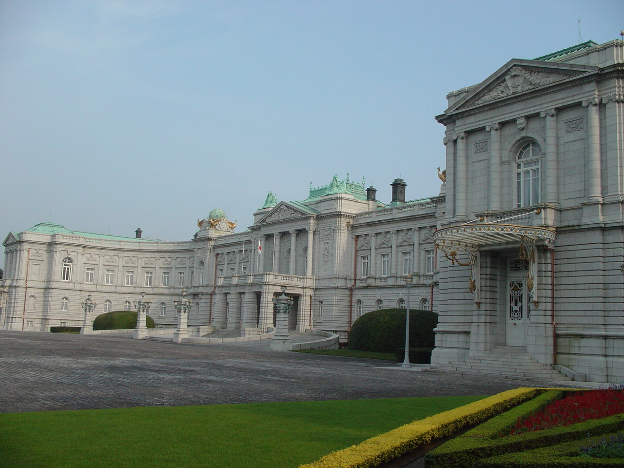 State Guest-House Akasaka Palace